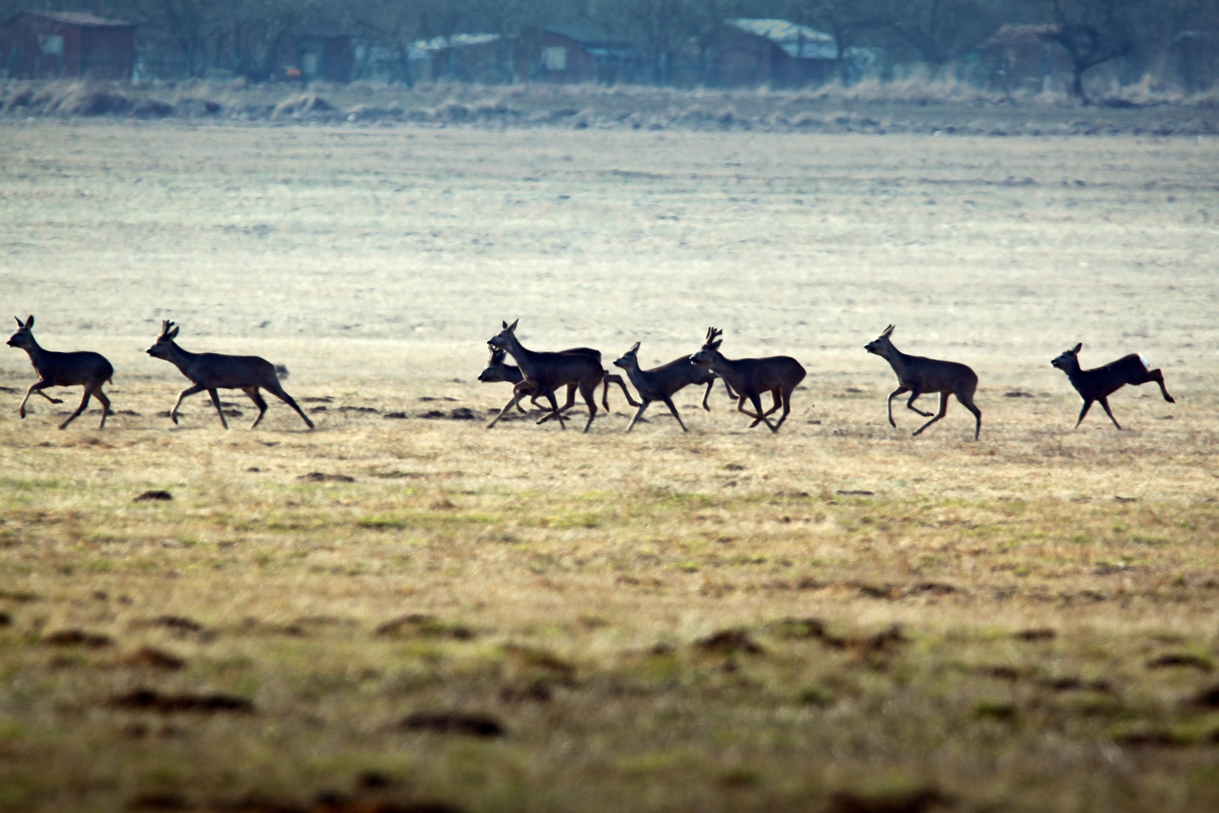 Specjalny obszar ochrony siedlisk Świdnik. This is a photography of Natura 2000 protected area with ID PLH060021